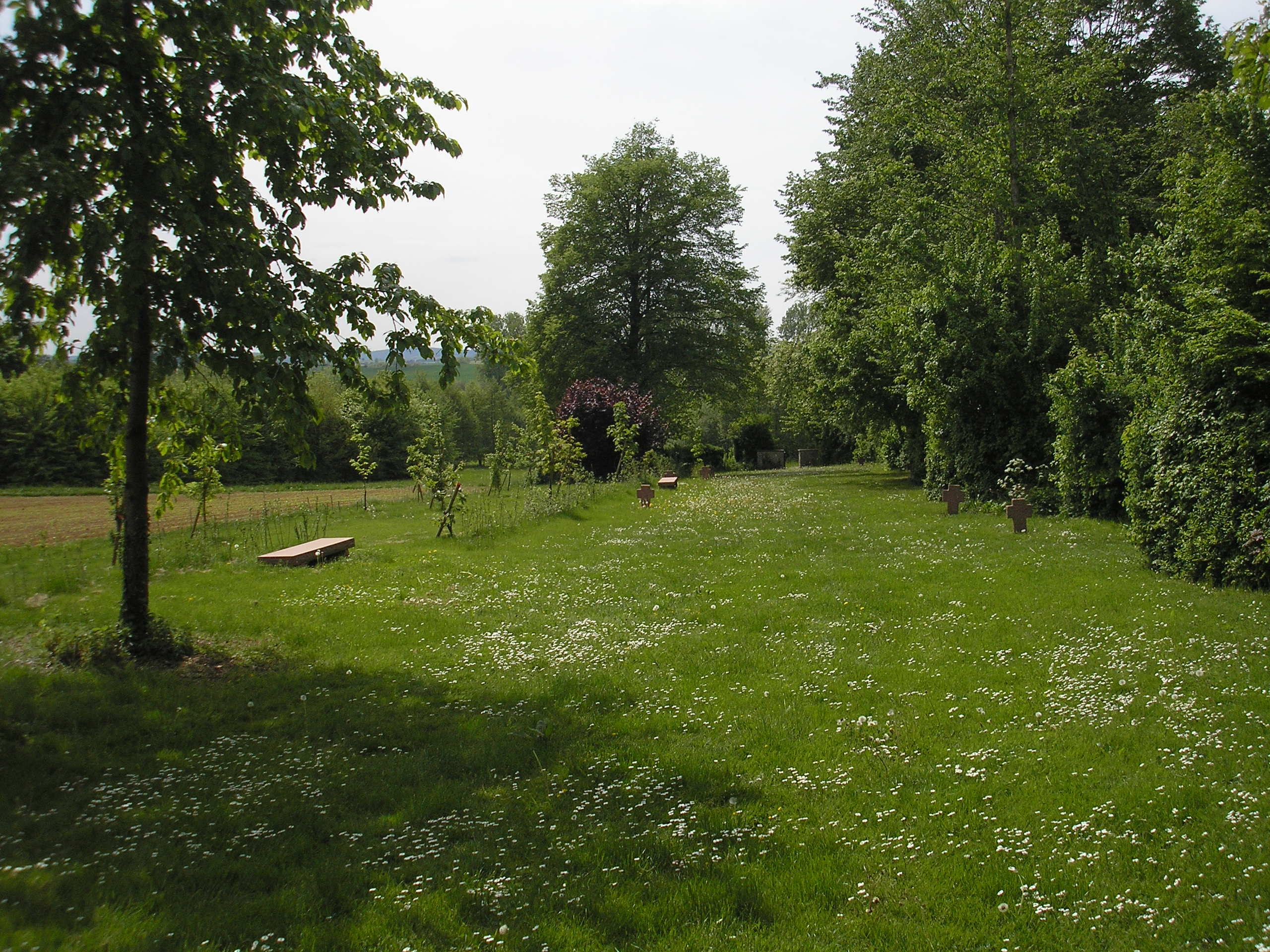 Ansicht nach Westen